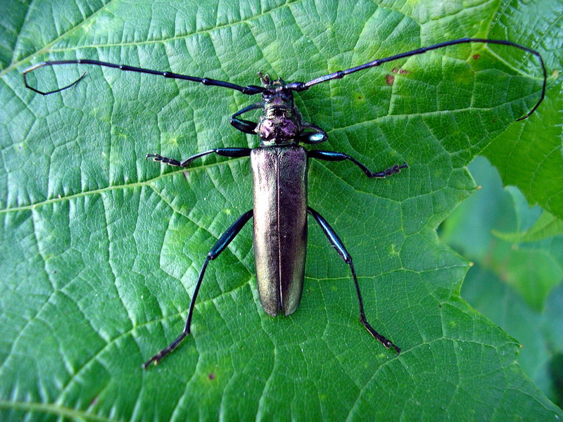 Aromia moschata. Veseluvka, Jonava district, Lithuania.